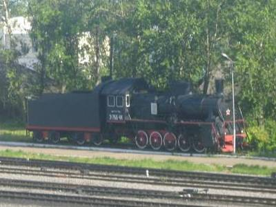 Sonkovo, steam locomotive (Russia)